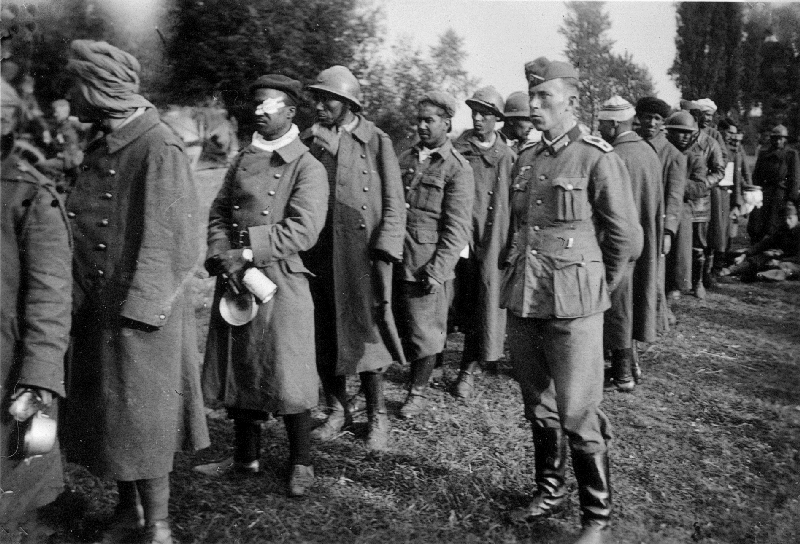 Gefangene Tirailleures betitelte der Großvater das Bild